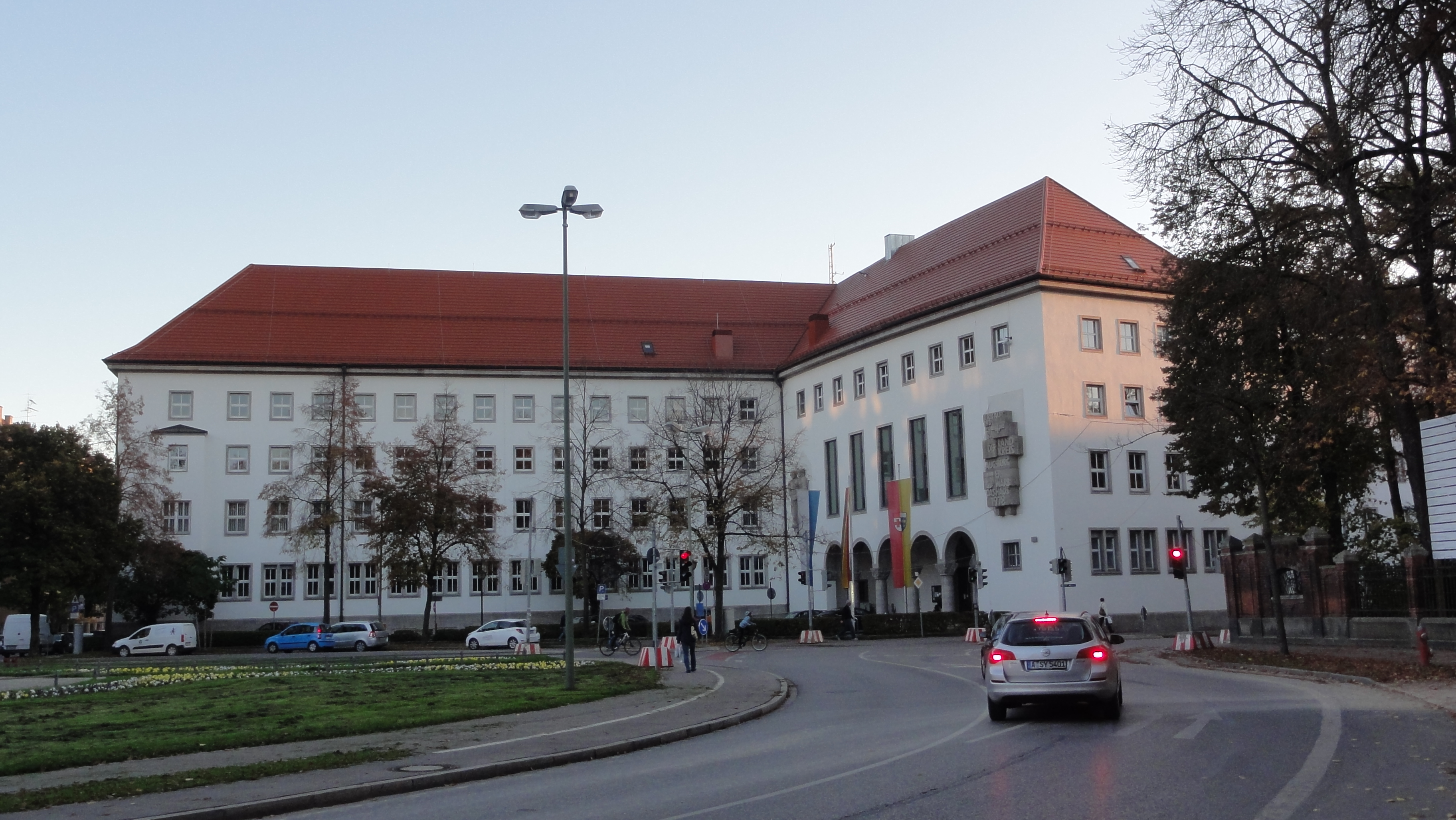 Augsburg, Prinzregentenplatz